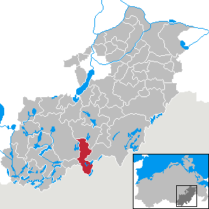 Wokuhl-Dabelow in Mecklenburg-Vorpommern, Landkreis Mecklenburg-Strelitz